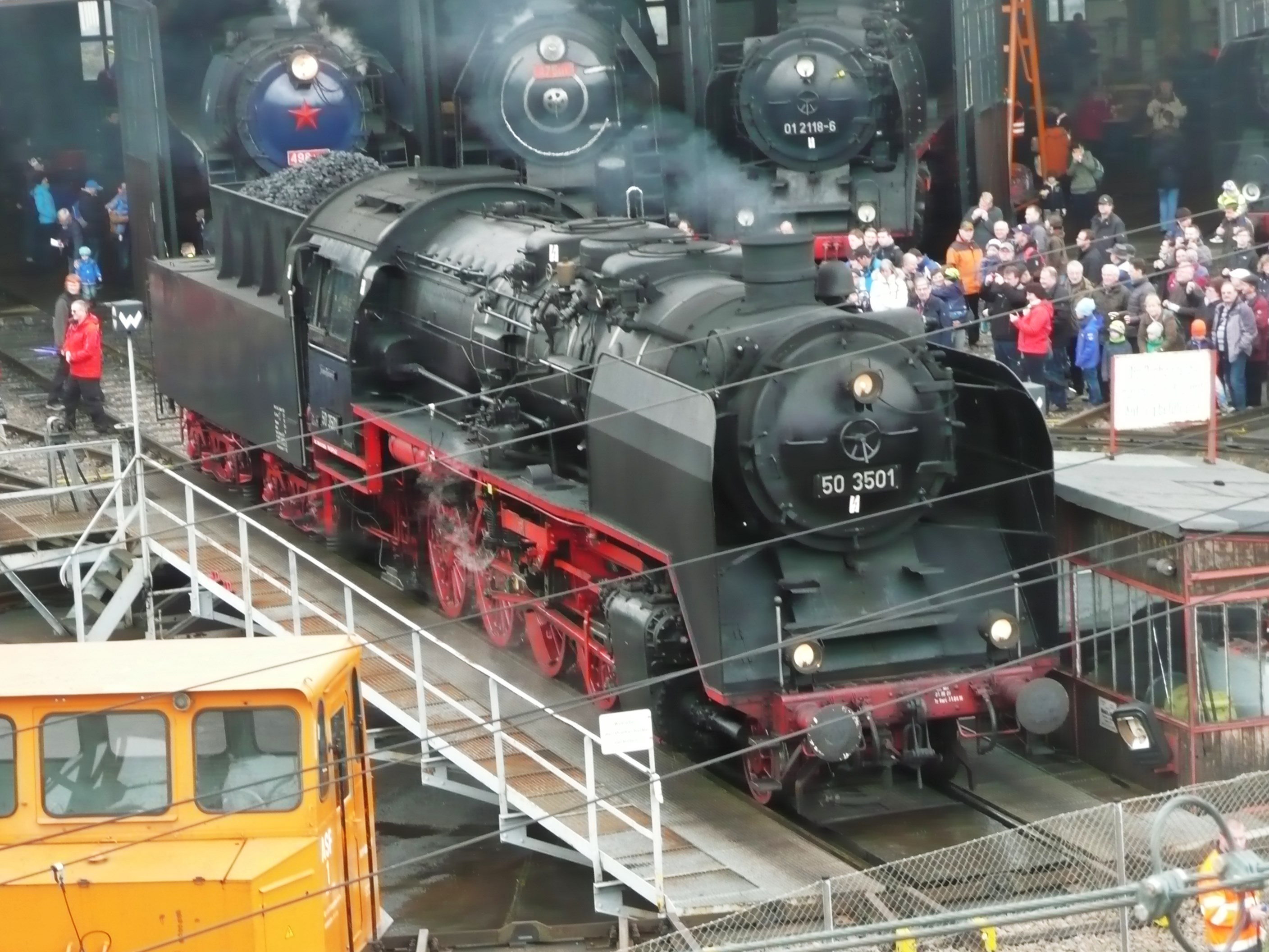 50 3501 beim Dampflokfest Dresden.